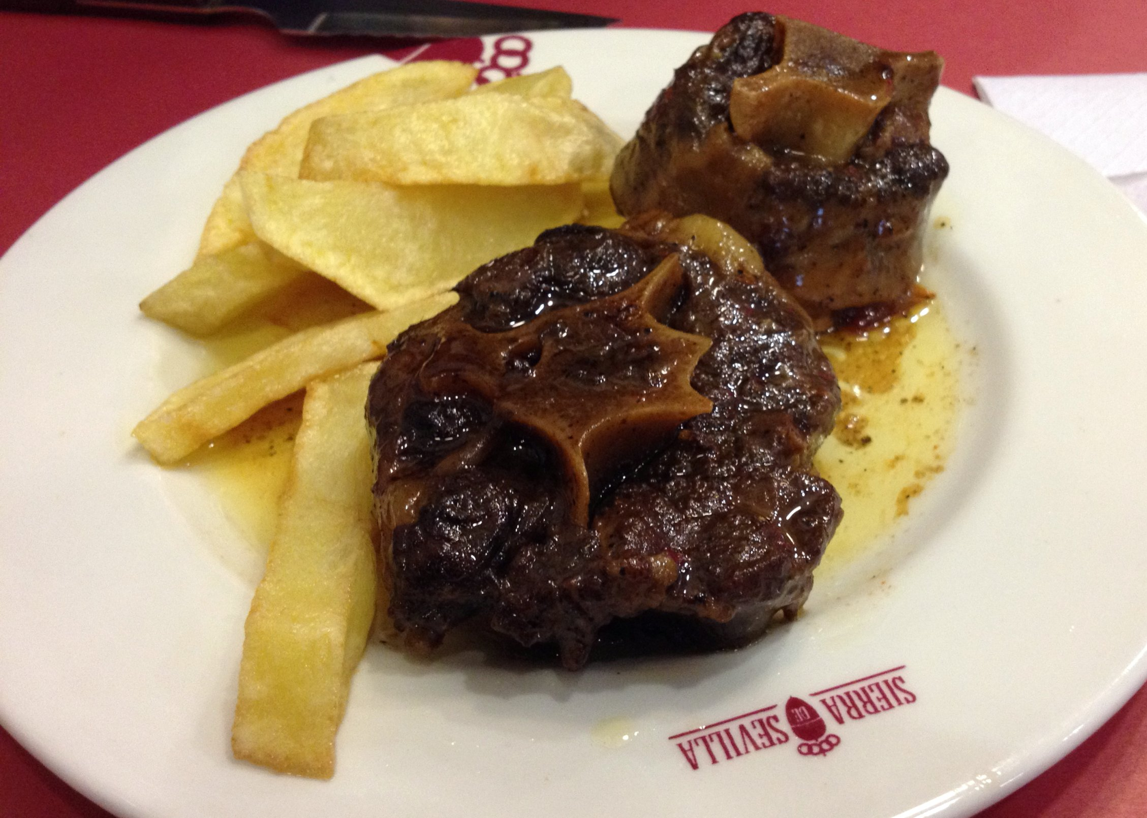 Un plato de rabo de toro.